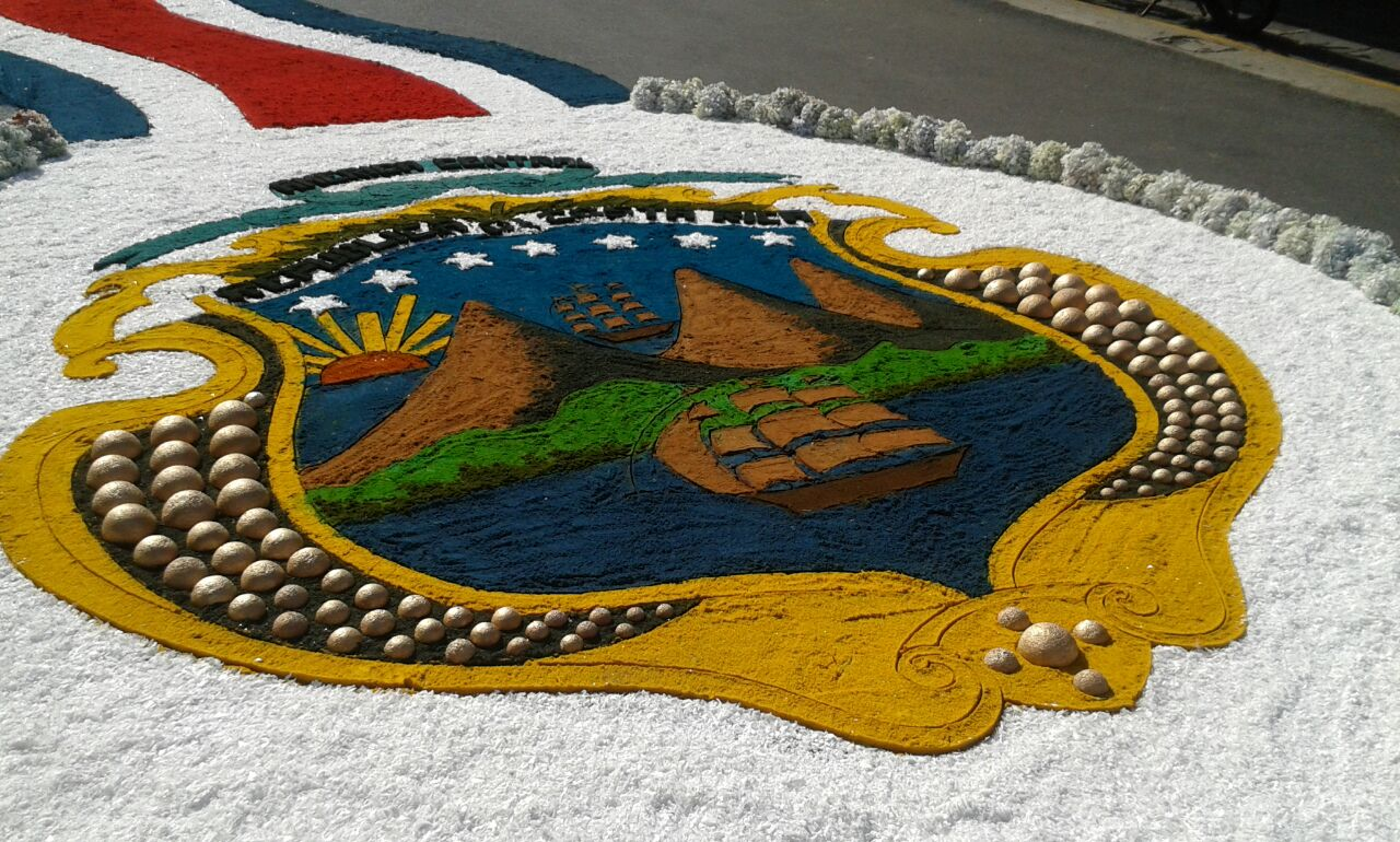 Pasada de la Negrita en Cartago, 6 septiembre de 2014. Costa Rica.